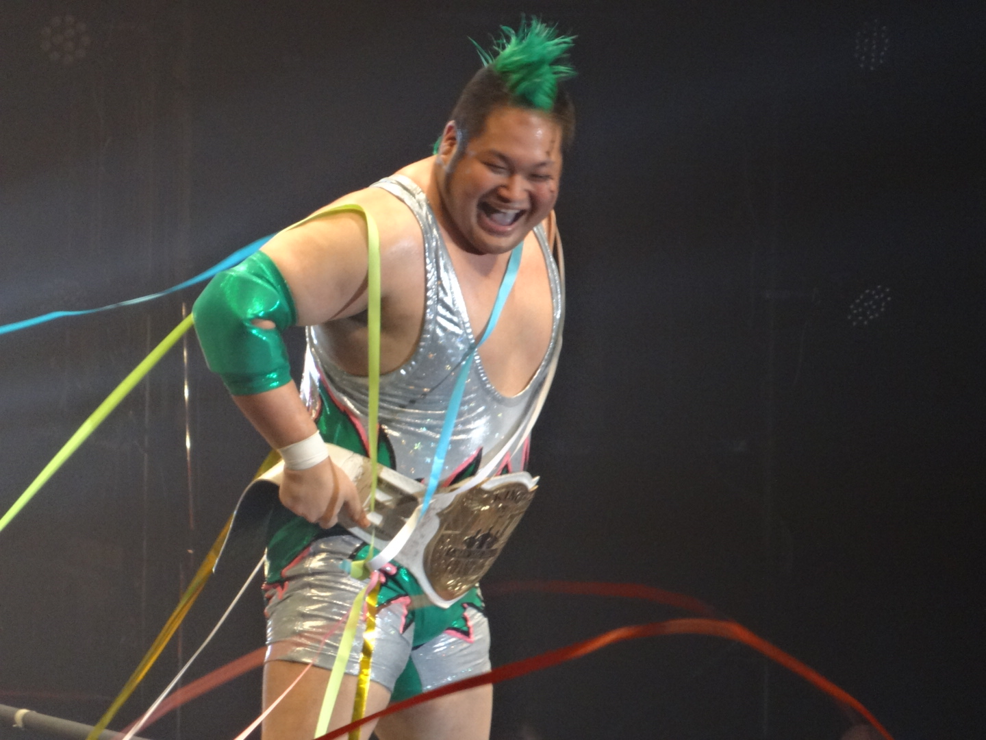 8.17両国